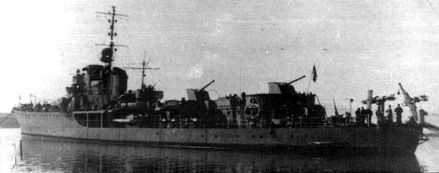 Der italienische Geleitzerstörer FORTUNALE vor der Auslieferung an die UdSSR